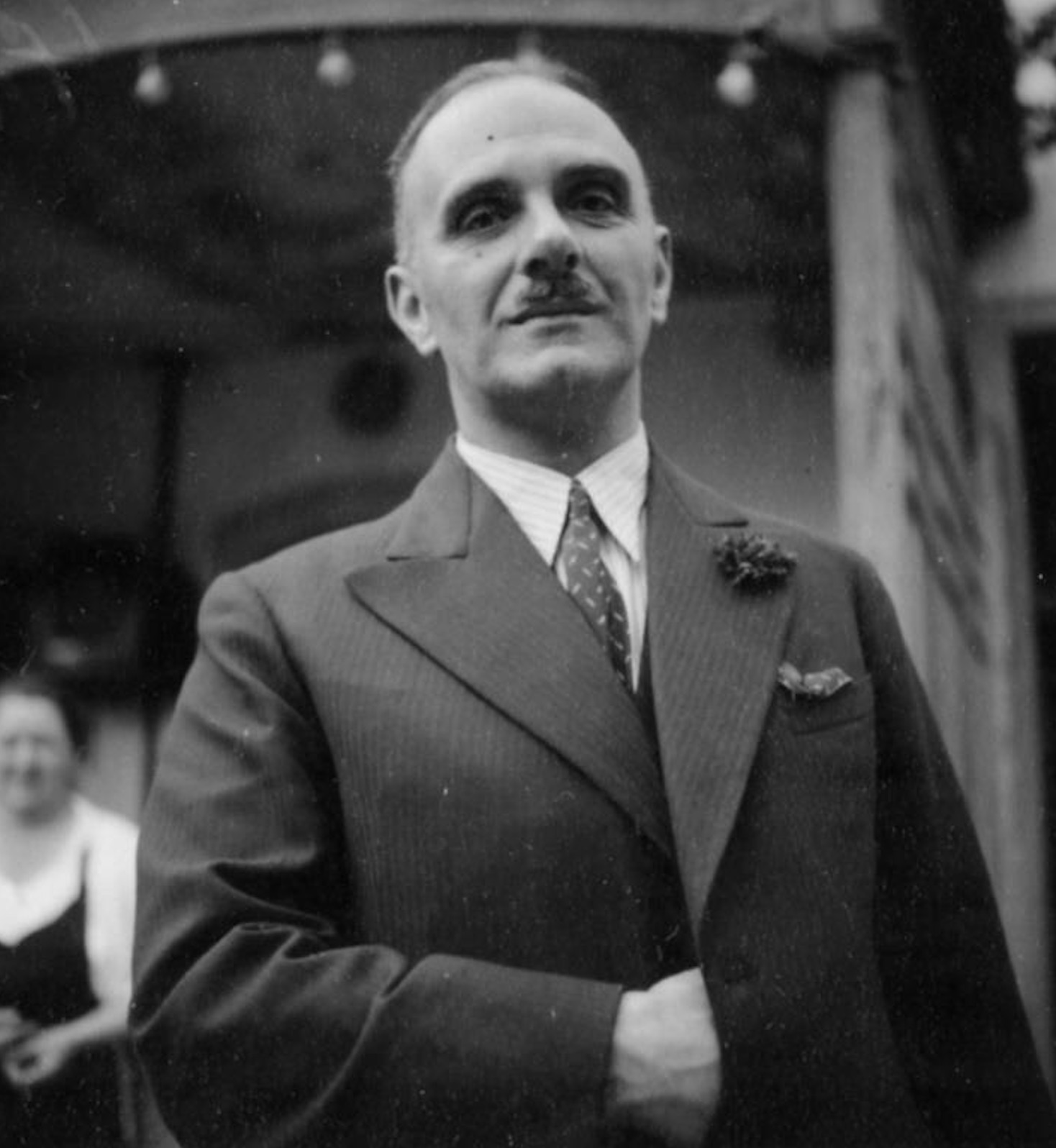 Peter Anton Feldscher (1889–1979), Schweizer Diplomat. Originallegende: Konferenz der Schweizer Gesandten, mit Ausflug und Gesamtbundesrat, Dr. Feldscher, Bern